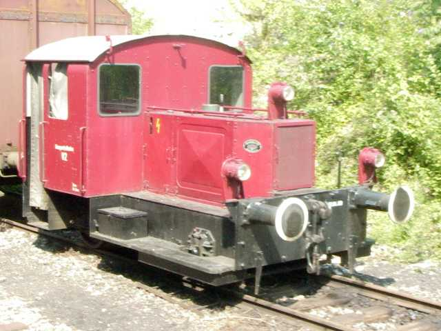 Kleinlok Kö I, ex DB Baureihe 311, als Museumslok bei der Hespertalbahn